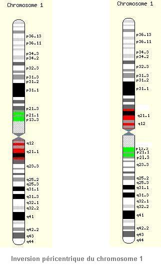 Inversion pericentrique L'image de ce chromosome est copiè depuis Ensembl Genome Browser. Les modifications (couleur et inversion plus titre sont de moi. Déclaration de la page d'accueil : Access to all the data produced by the project, and to the software used to analyse and present it, is provided free and without constraint